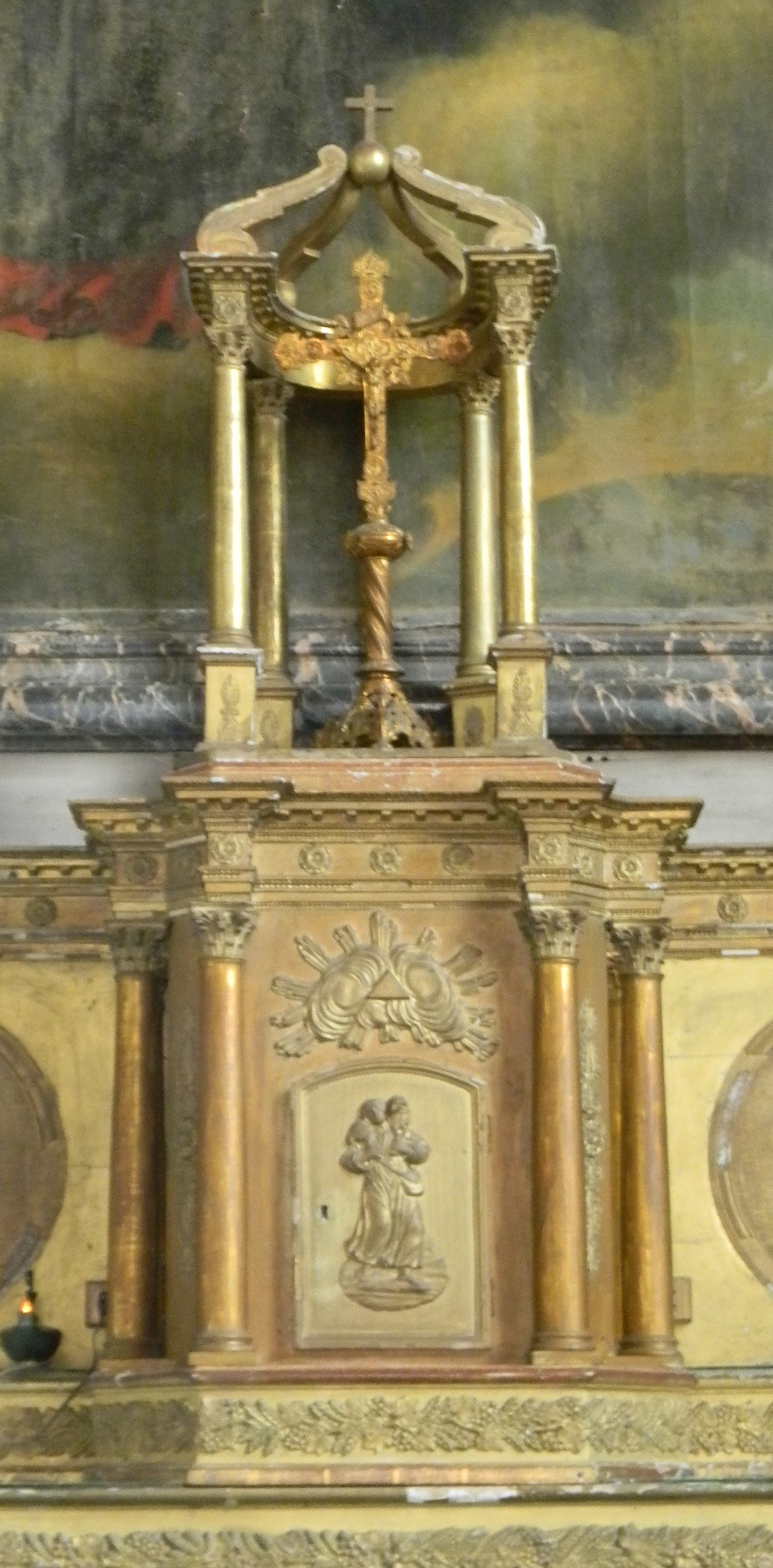 Le thabor central de l'église Notre Dame de Brissarthe